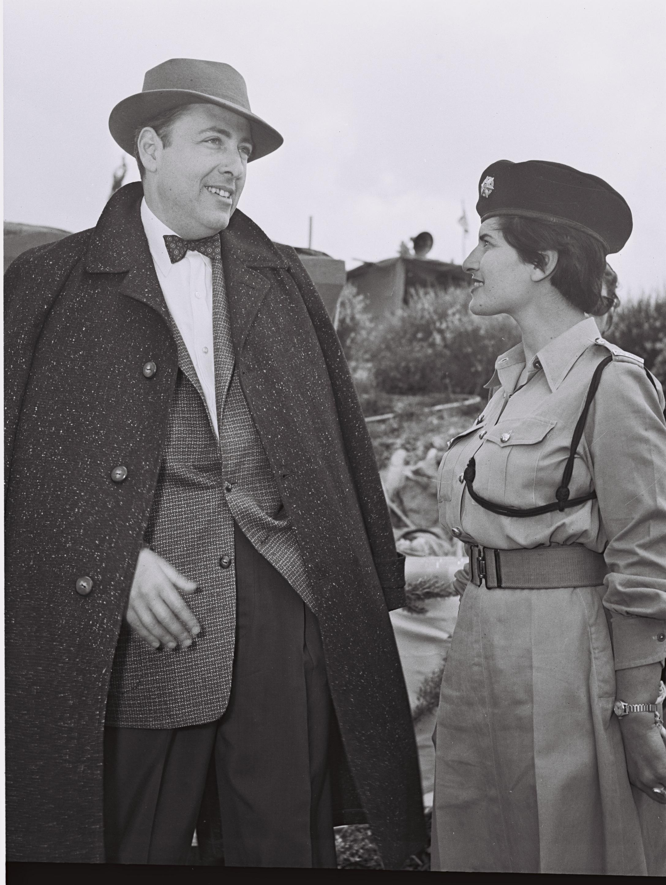 Herman Wouk in Jerusalem, 1955 INDEPENDENCE DAY 1955. HERMANWOUK, AUTHOR OF CAINE MUTINY, AT THE LIBERTY BELL PRESENTATION IN JERUSALEM.